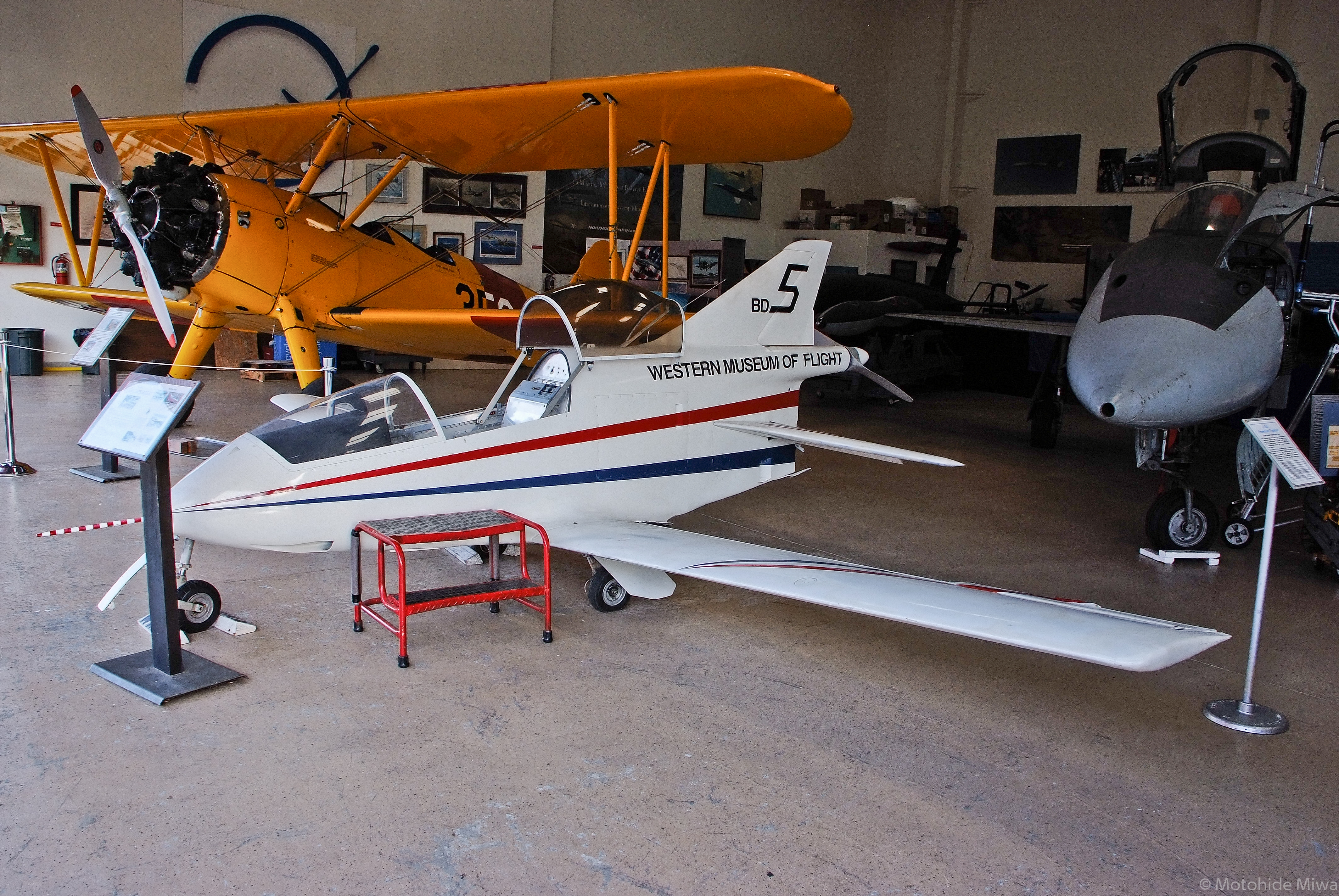 Bee Dee (BD) Propeller version